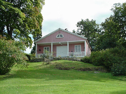 Villa Carolina (Gustavsberg 1:24)